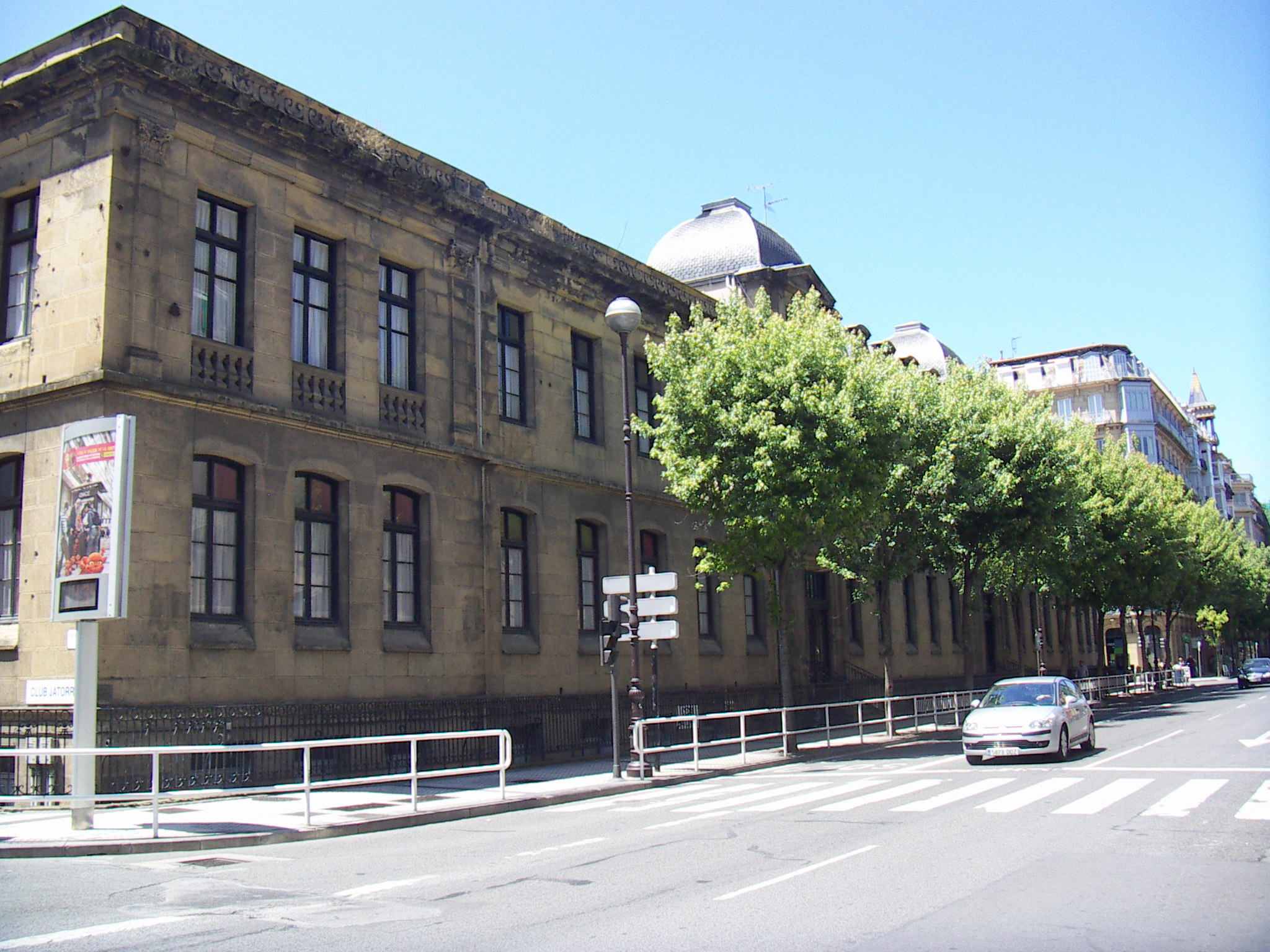 Urbieta kaleko Amarako eskolak